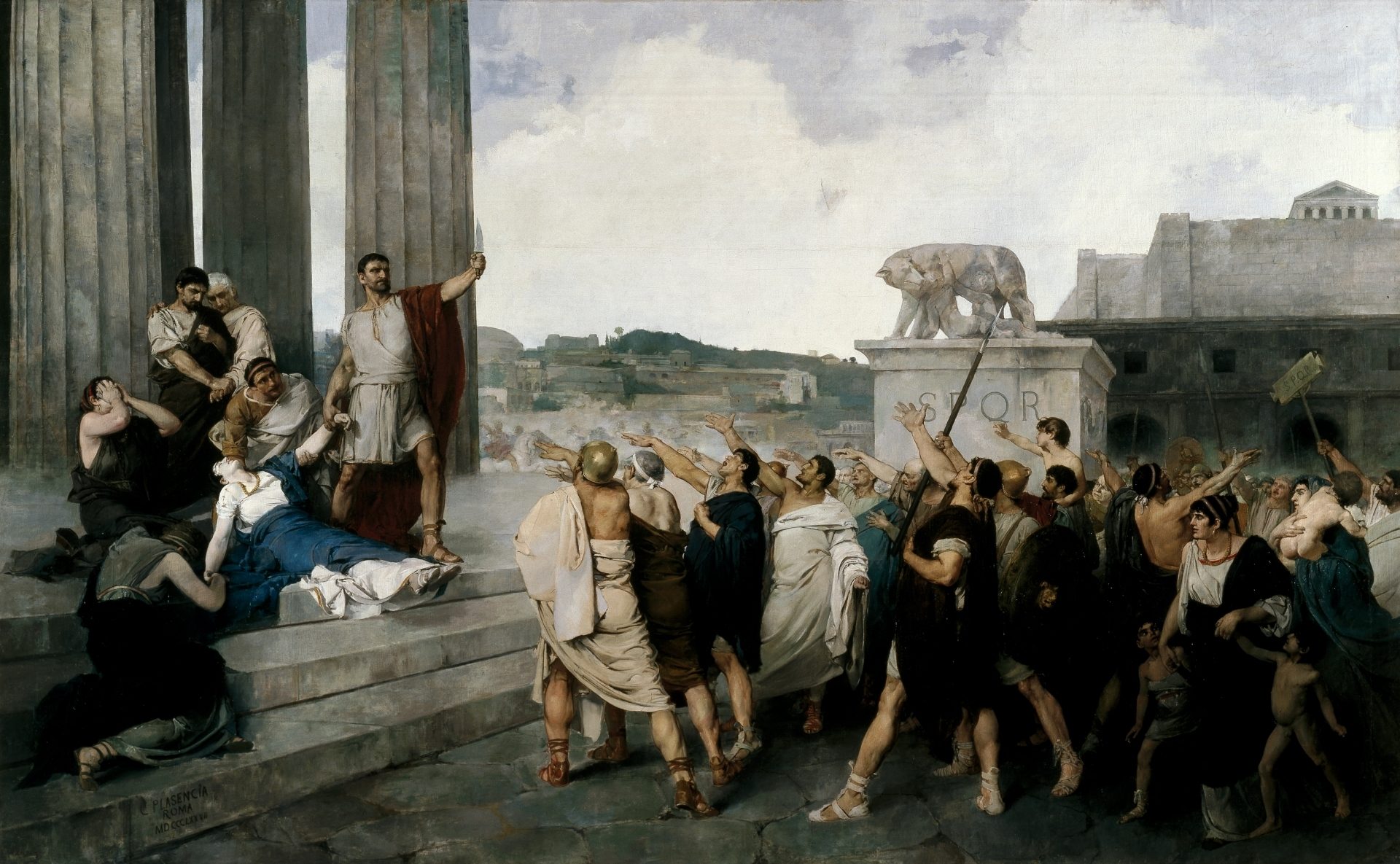 La obra representa a Lucrecia muerta en las gradas de un templo y a Lucio Junio Bruto sosteniendo una mano del cadáver y exigiendo venganza contra el rey de Roma, lo que supuso el nacimiento de la República.